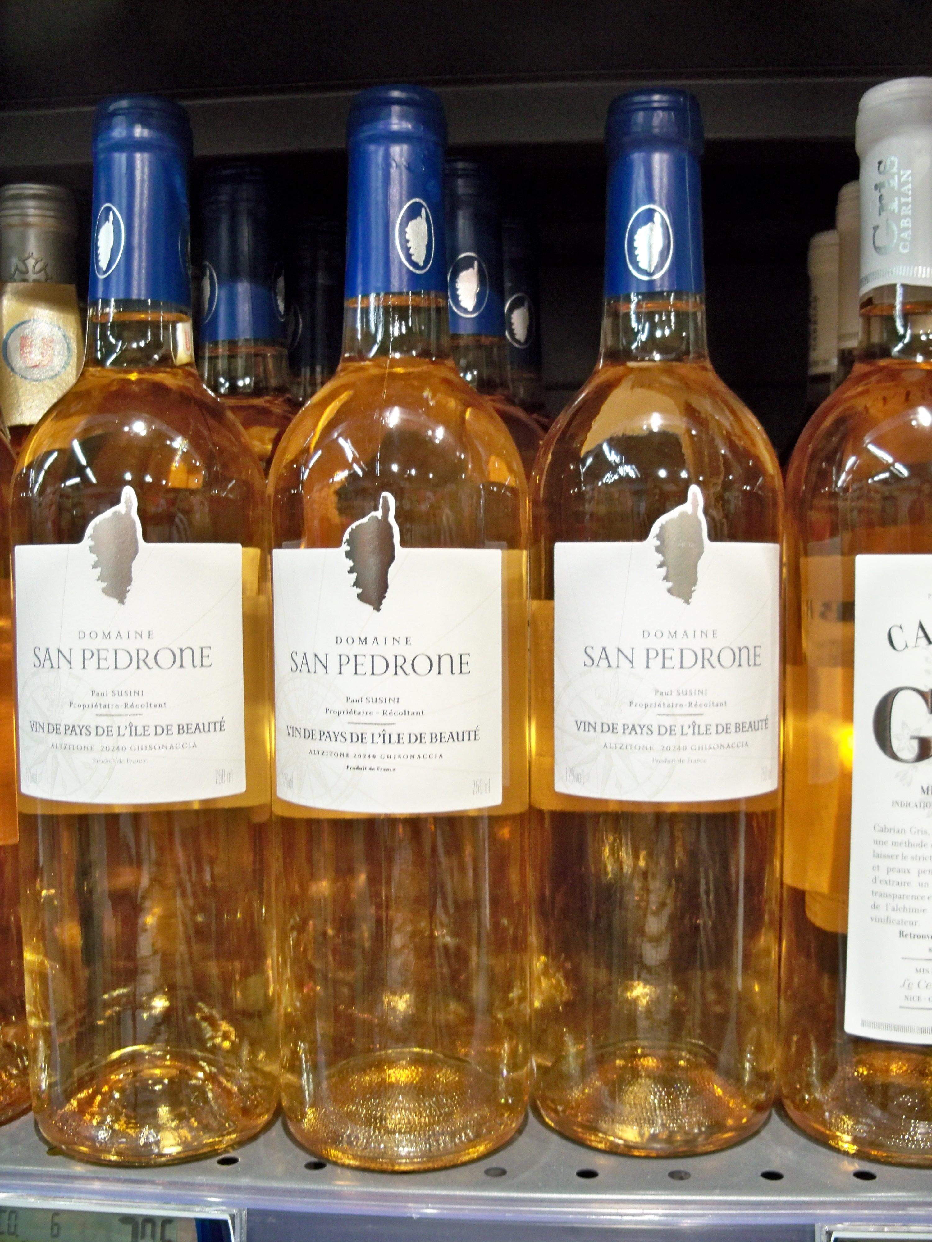 Bouteille de Domaine San Pedrone